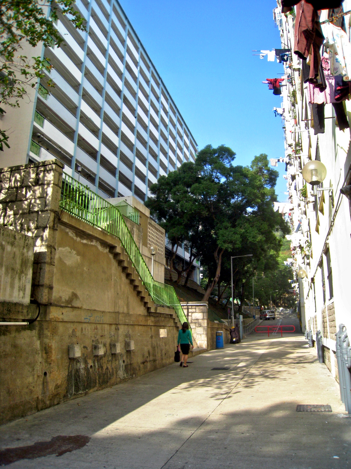 So Uk Estate 蘇屋邨